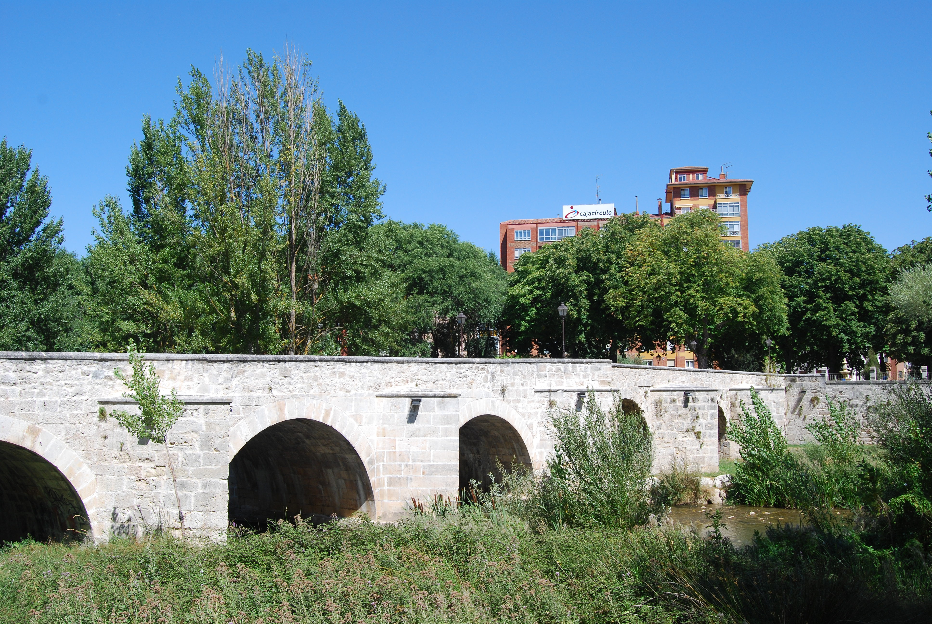 Burgos. Puente de Malatos. Al fondo, a la derecha, el Paseo de la Isla.